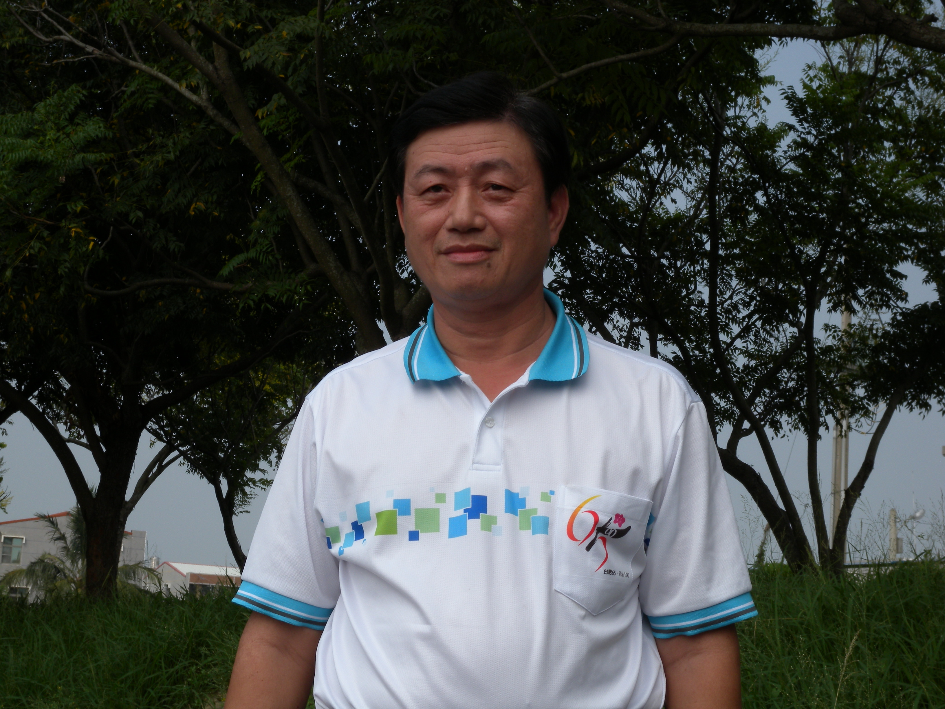 鄧豐洲2011年照片